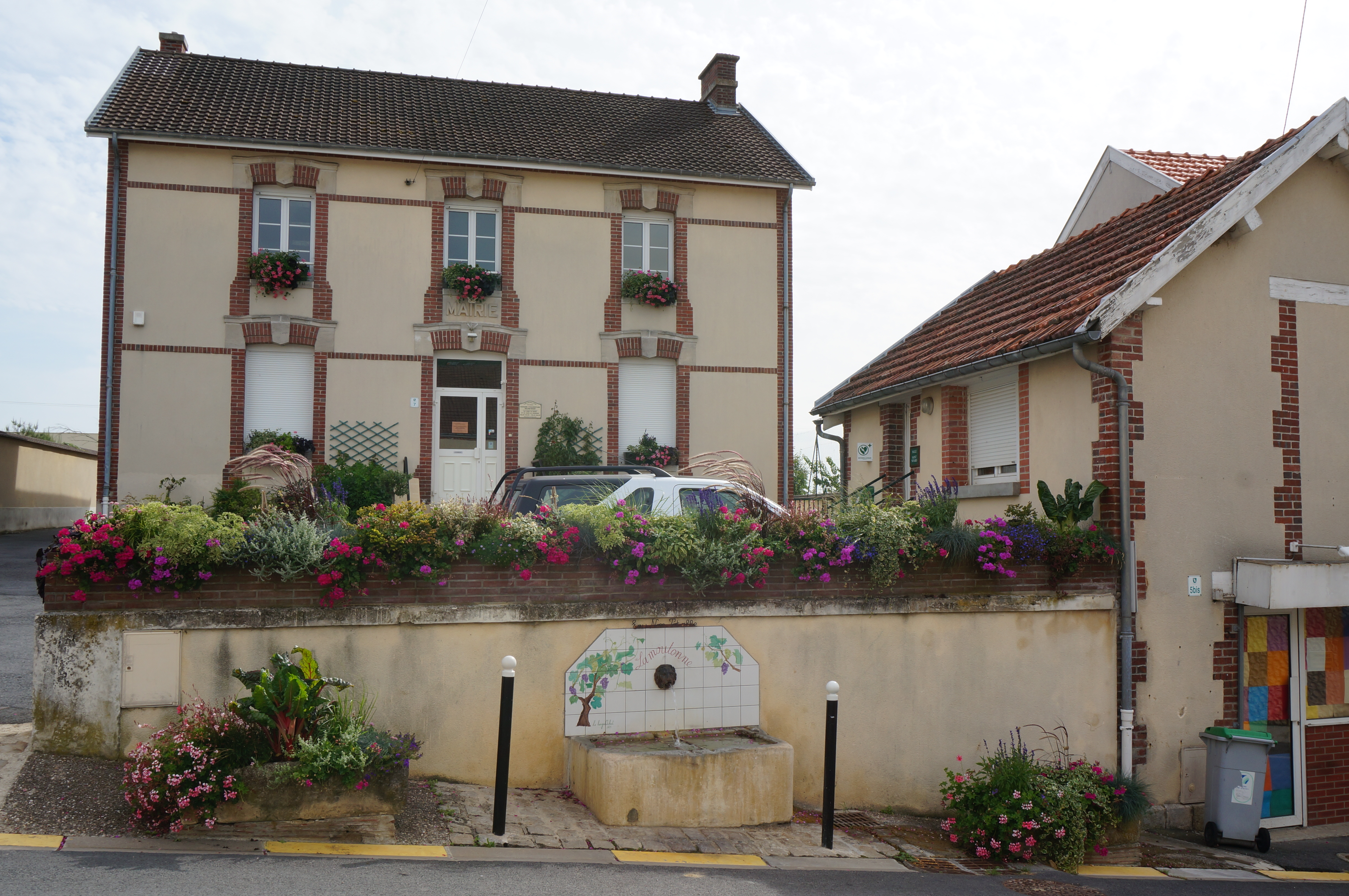 La Mairie à Champillon .